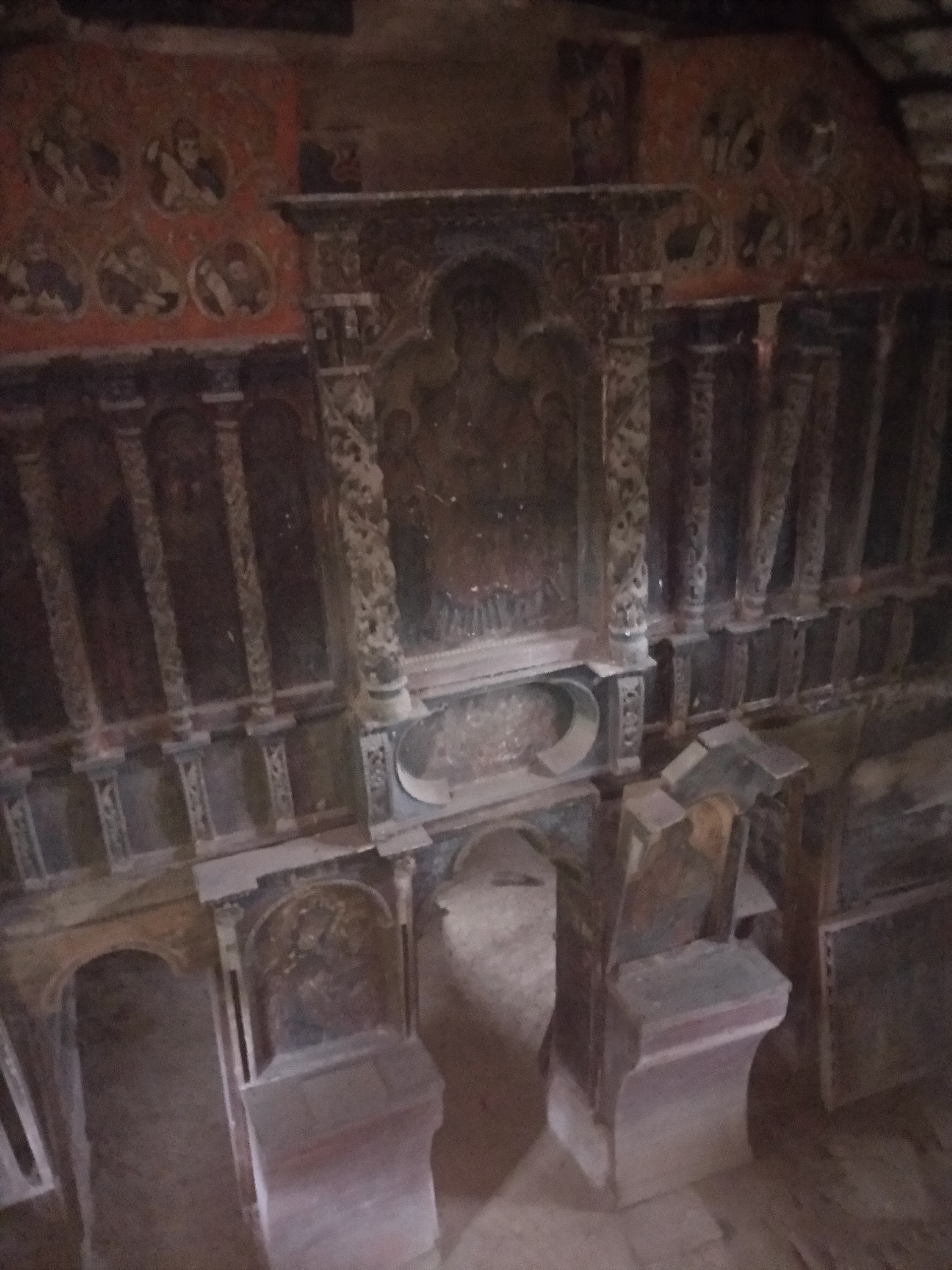 фотографію розпису церкви